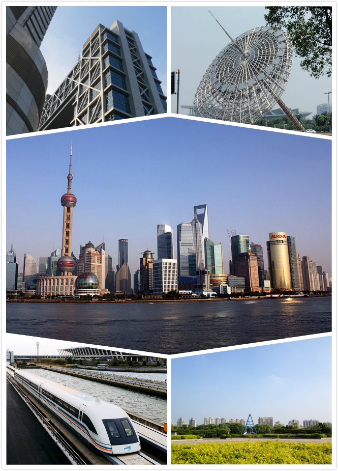 上海浦东（拼图）